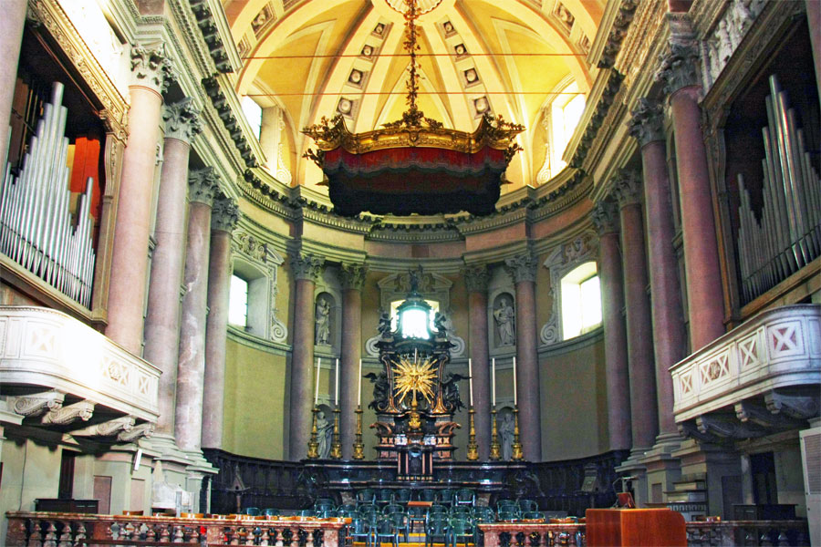 Novara - Basilica di San Gaudenzio, presbiterio